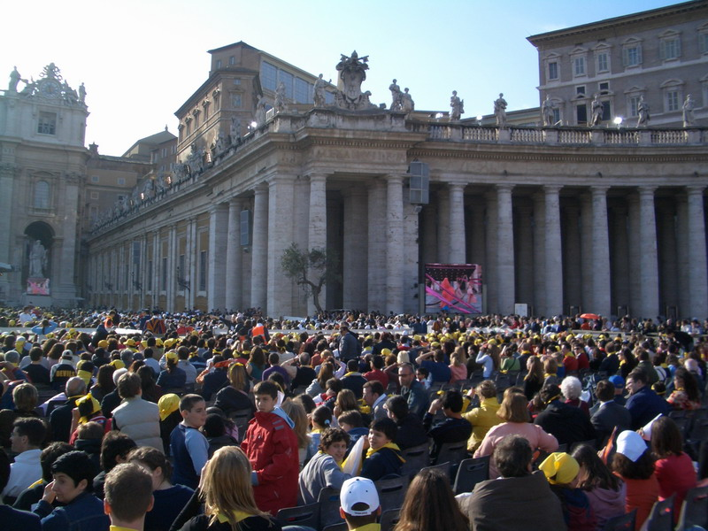 La Place Saint-Pierre était couverte de monde à l'occasion des JMJ 2006